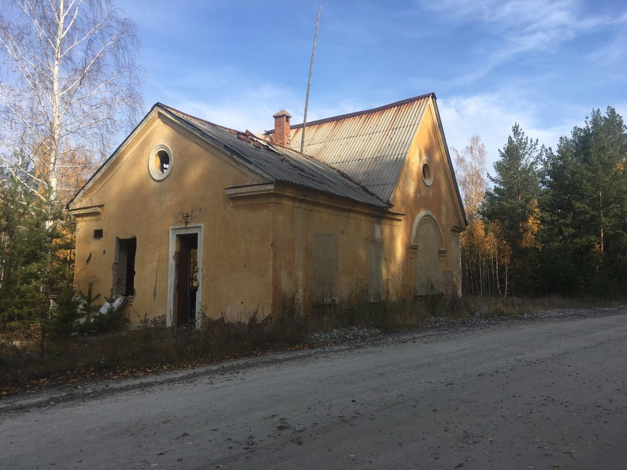 Неиспользуемая станция Анбашская